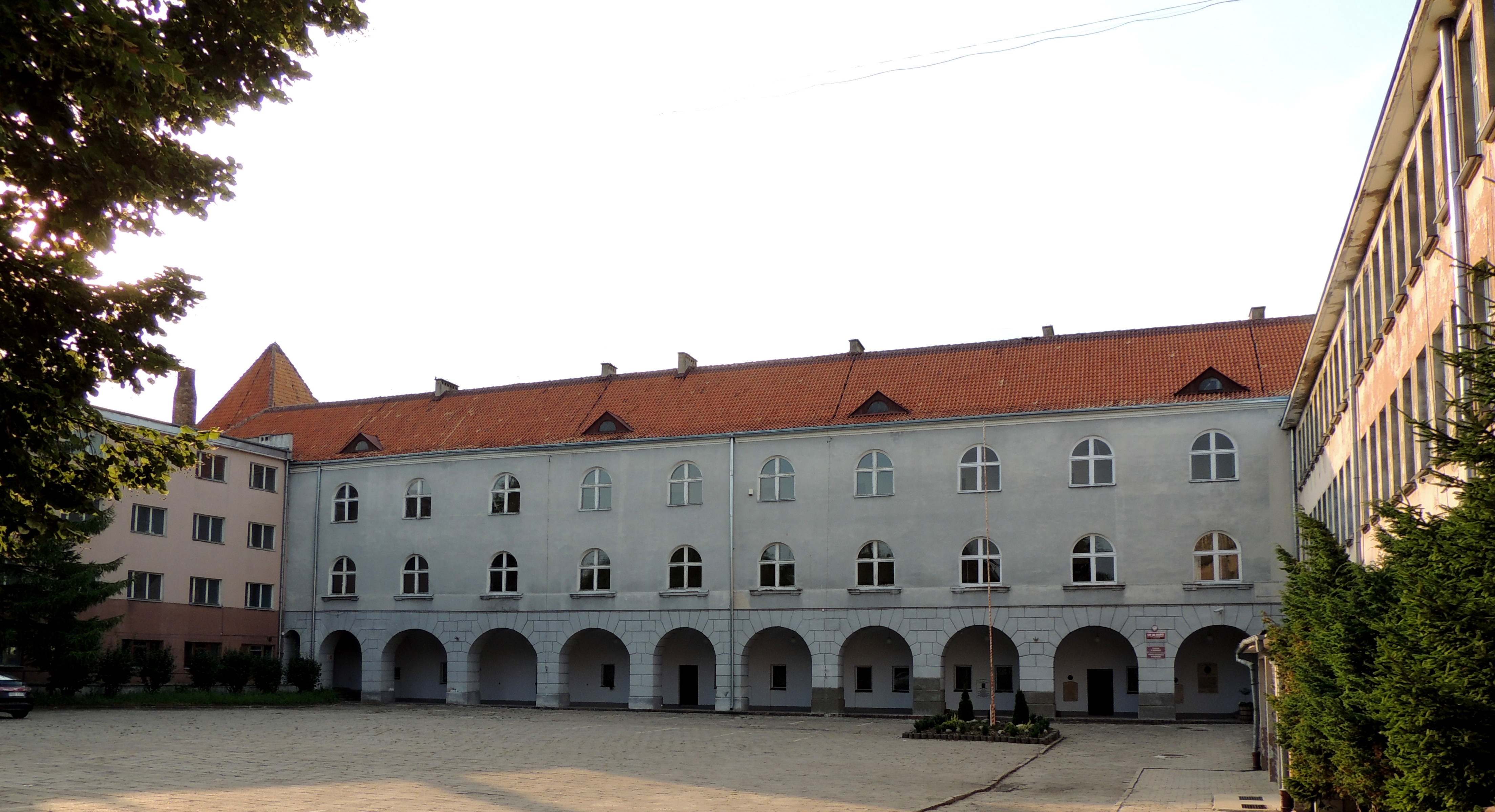 Braniewo, gimnazjum jezuickie (Liceum Hosianum), 1743-1771